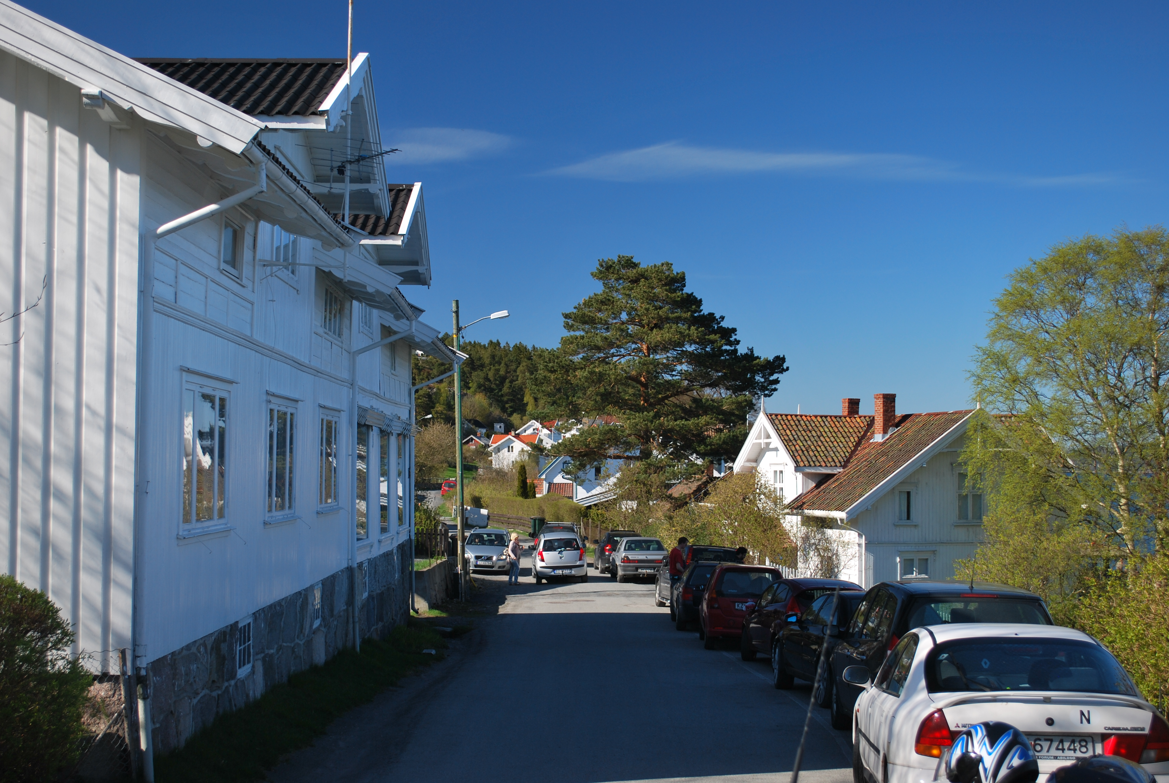 Filtvet, Nordstrandveien sett mot nord fra nedkjørselen til Filtvet fyr